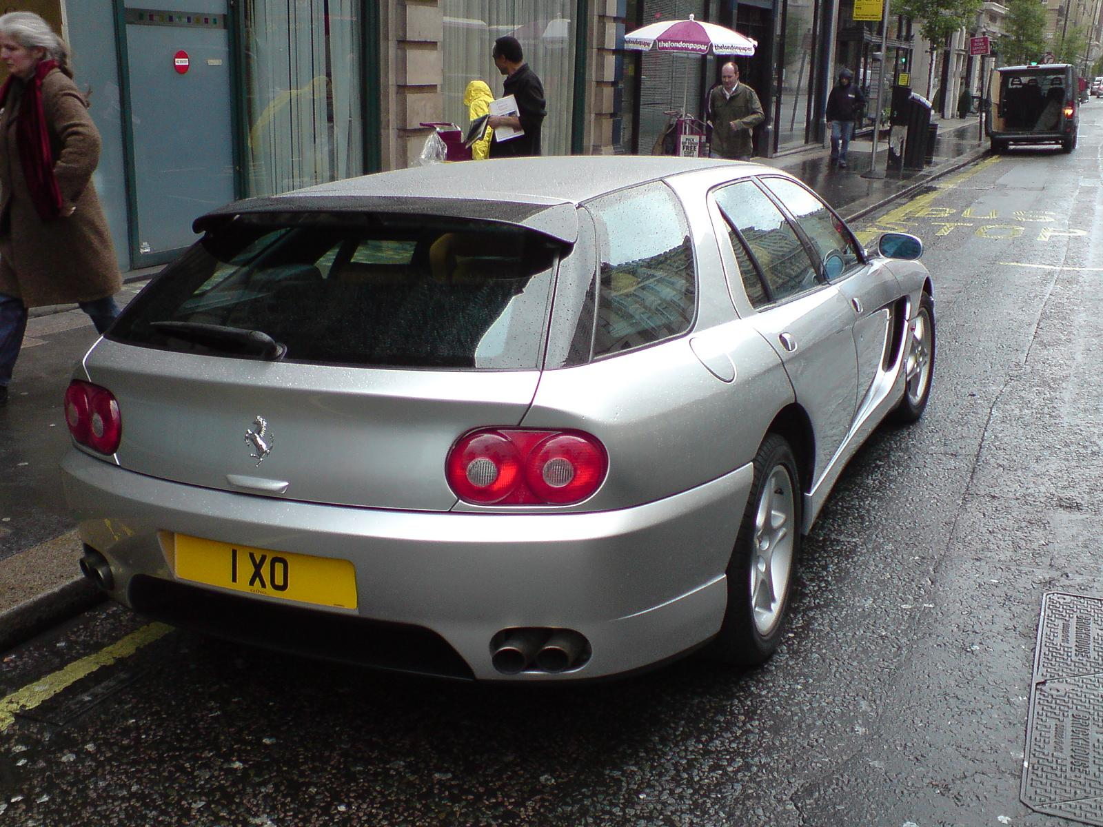 Ferrari 456E (Estate)